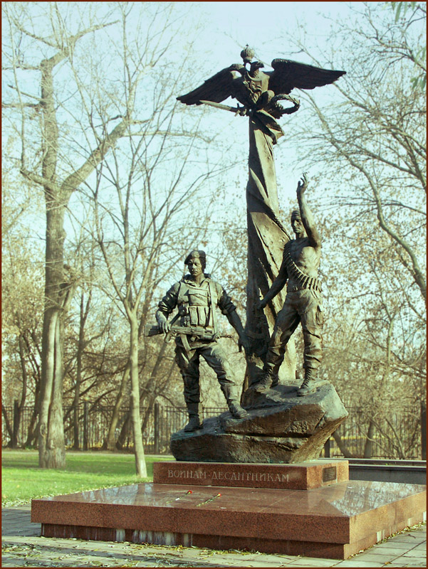 Орлам 6-й Псковской роты